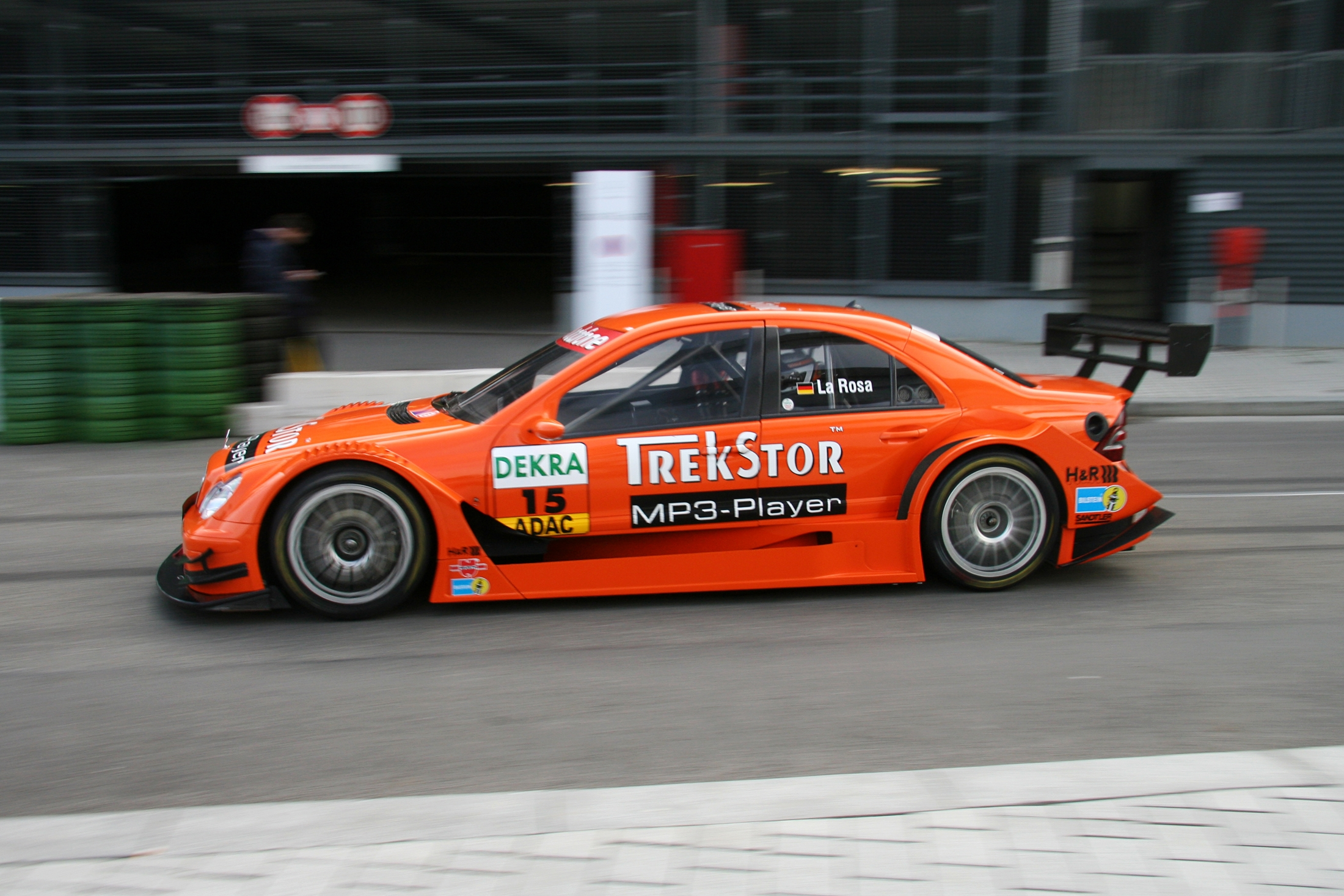 DTM car Mercedes-Benz Season 2007 (C-Class, W203), Daniel la Rosa (driver)